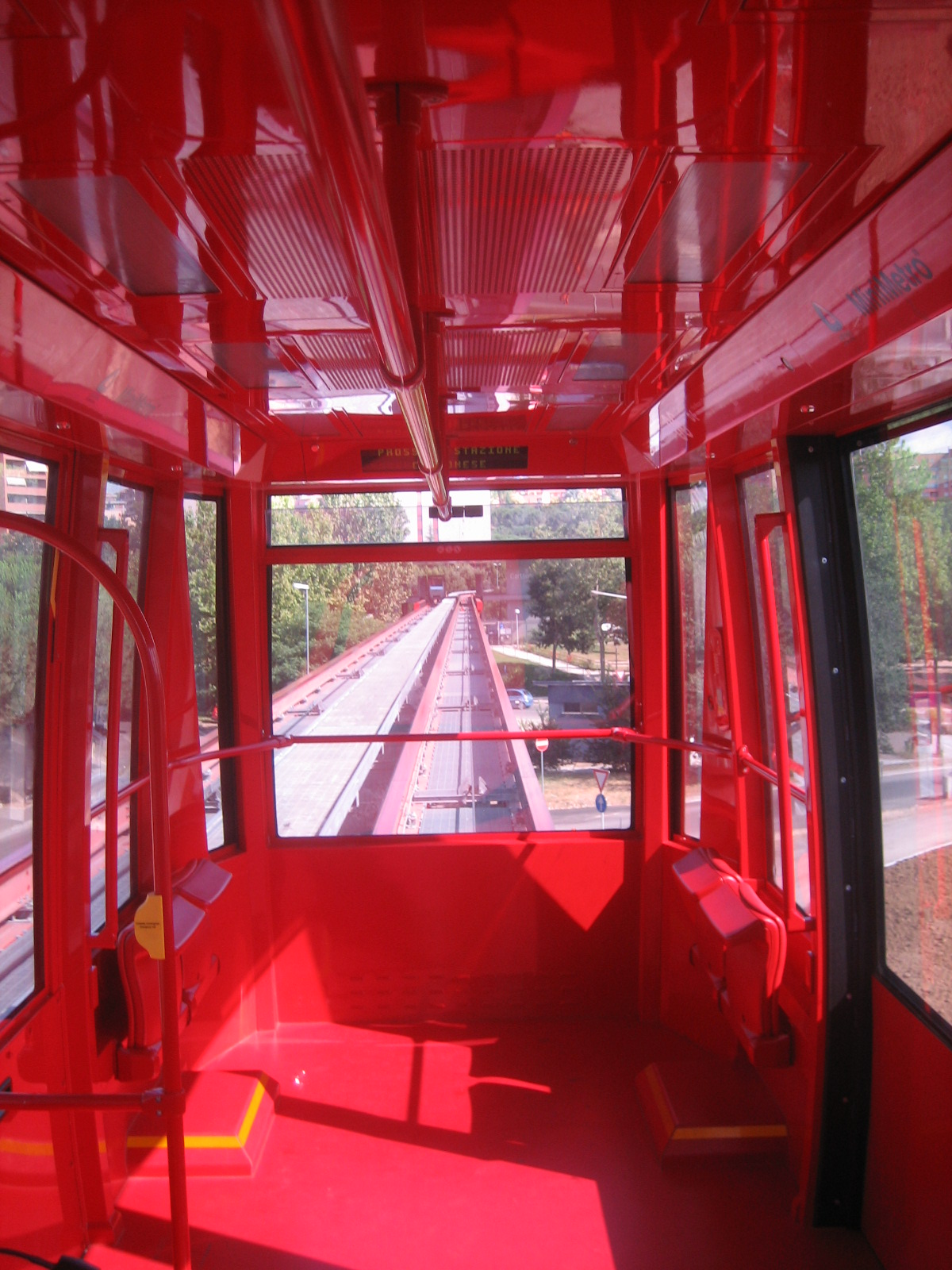 l'interno di una cabina elettrica del minimetrò di Perugia